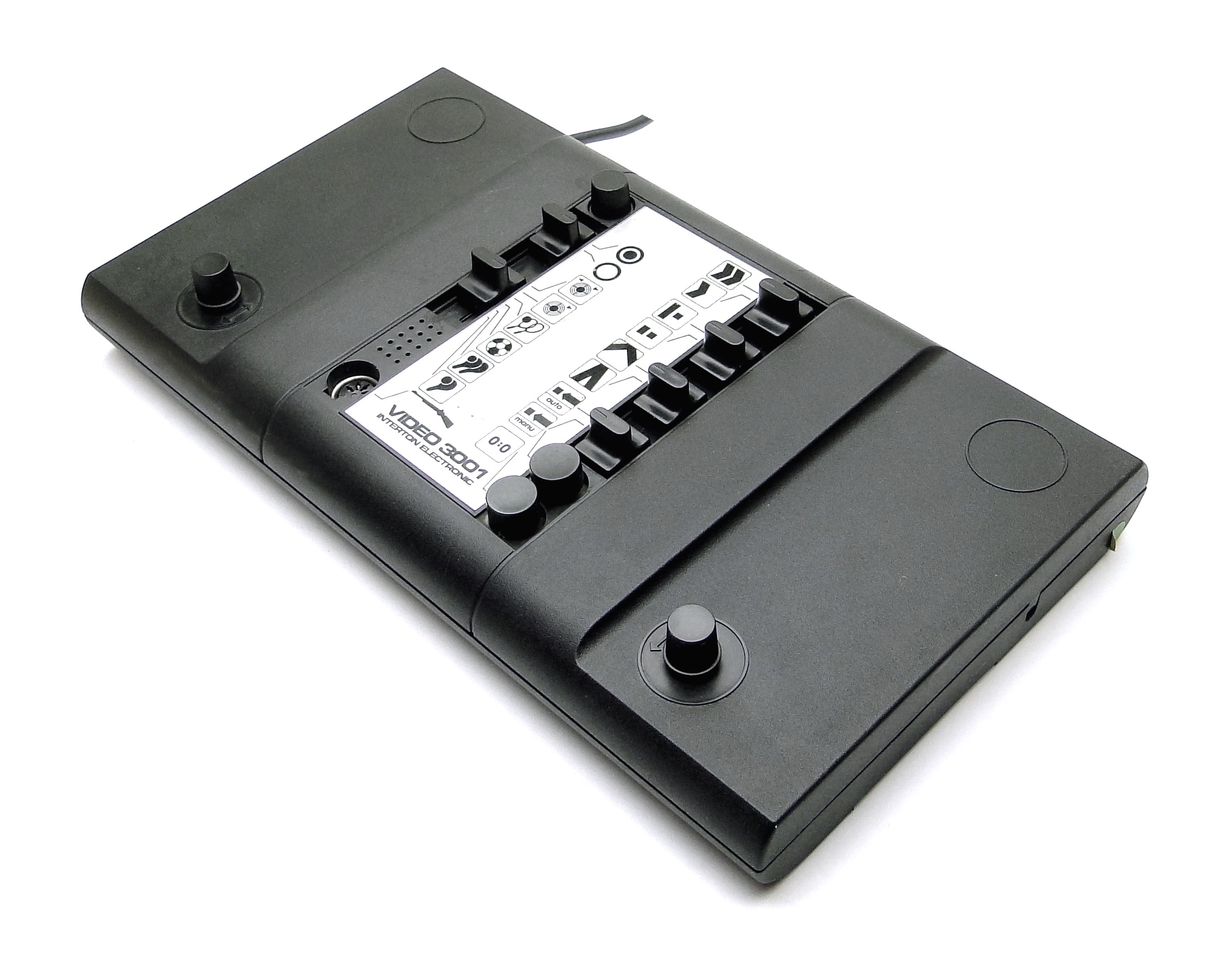 Interton Video 3001 Variante 1